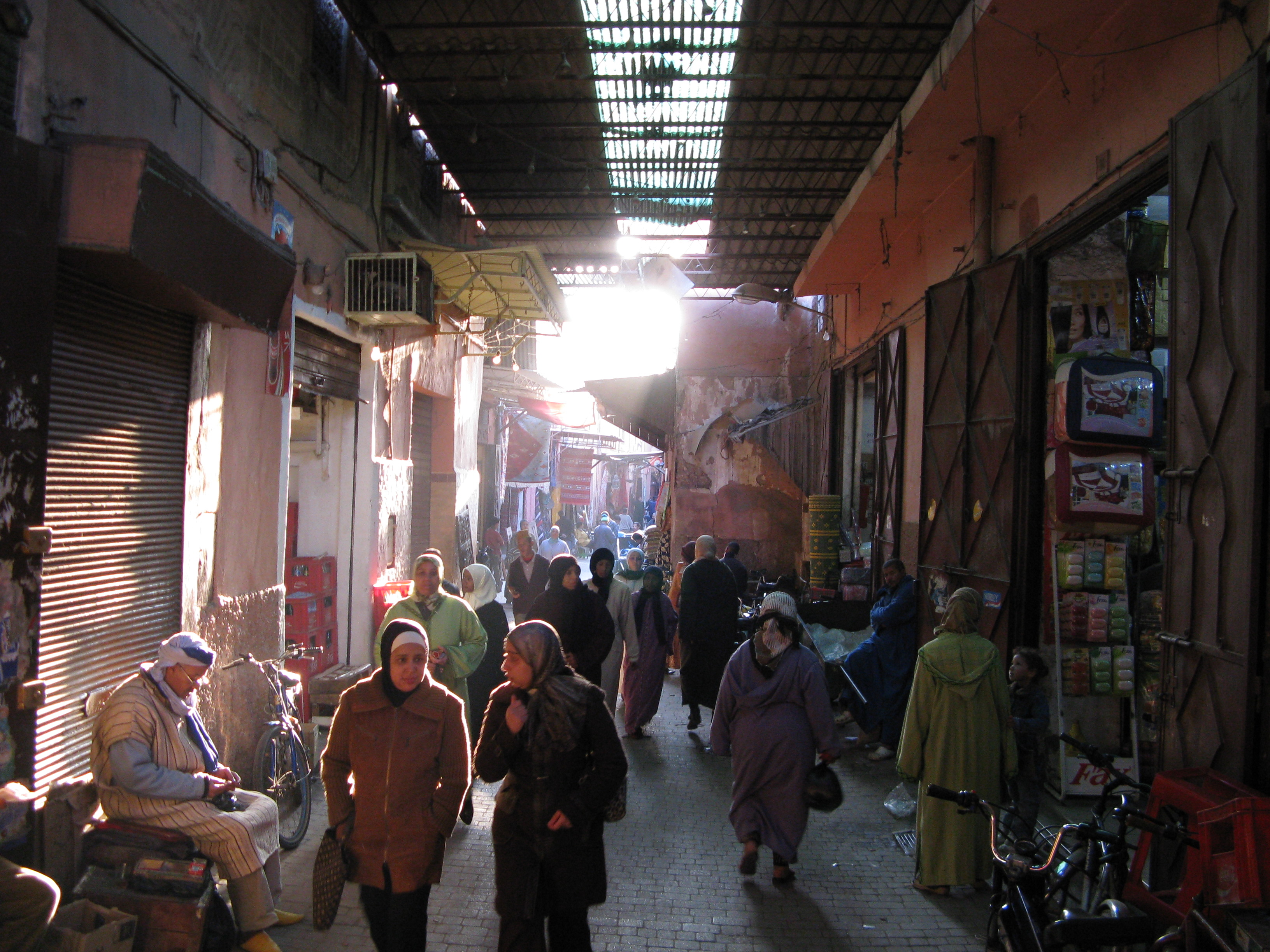 Souk, Marakech